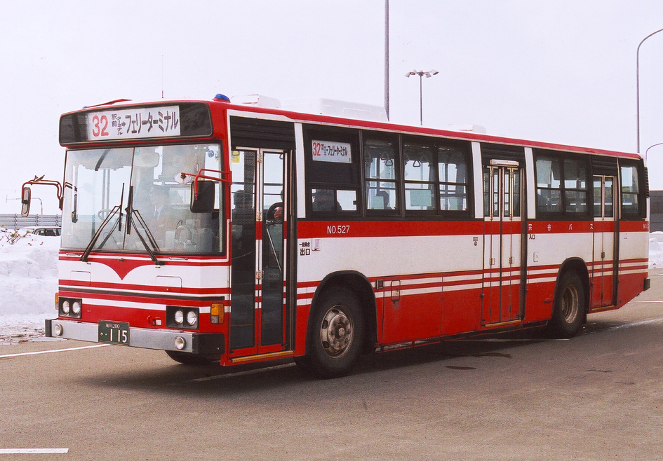 宗谷バス 日野・ブルーリボン P-HT276BA 3ドア車